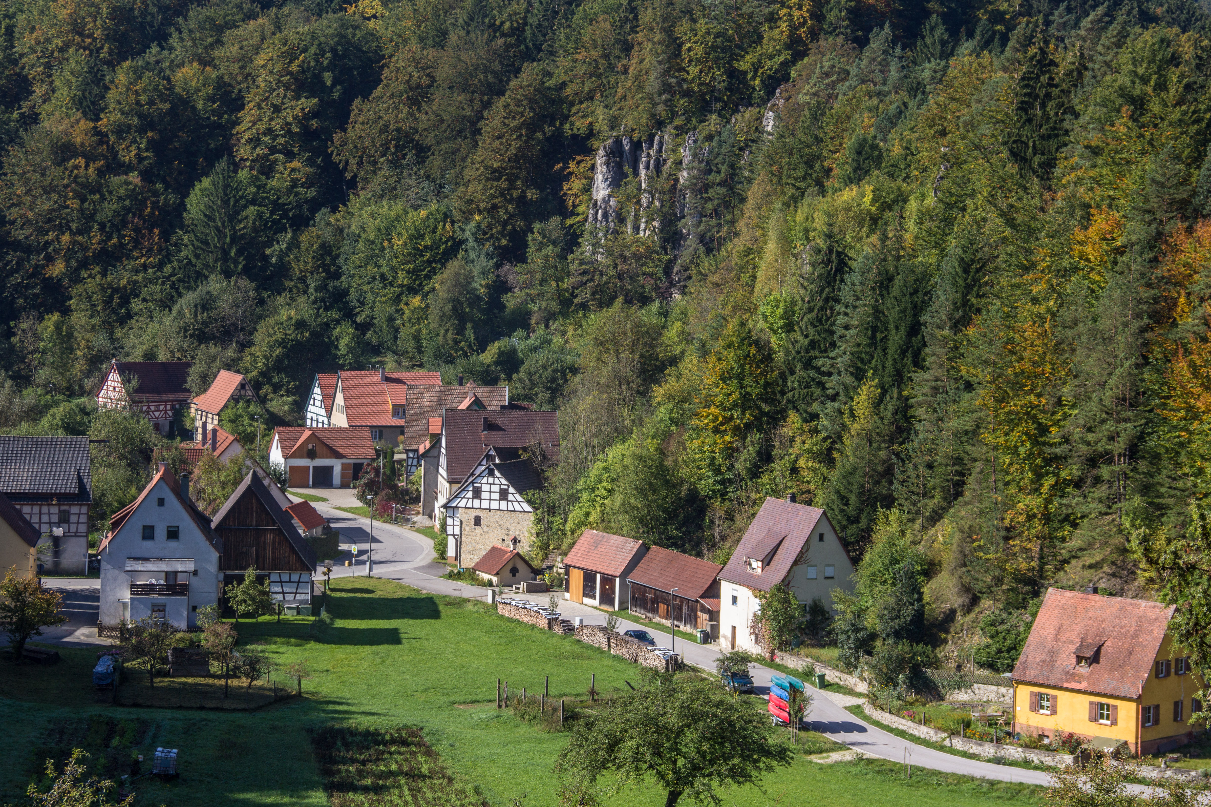 Blick auf Lungsdorf